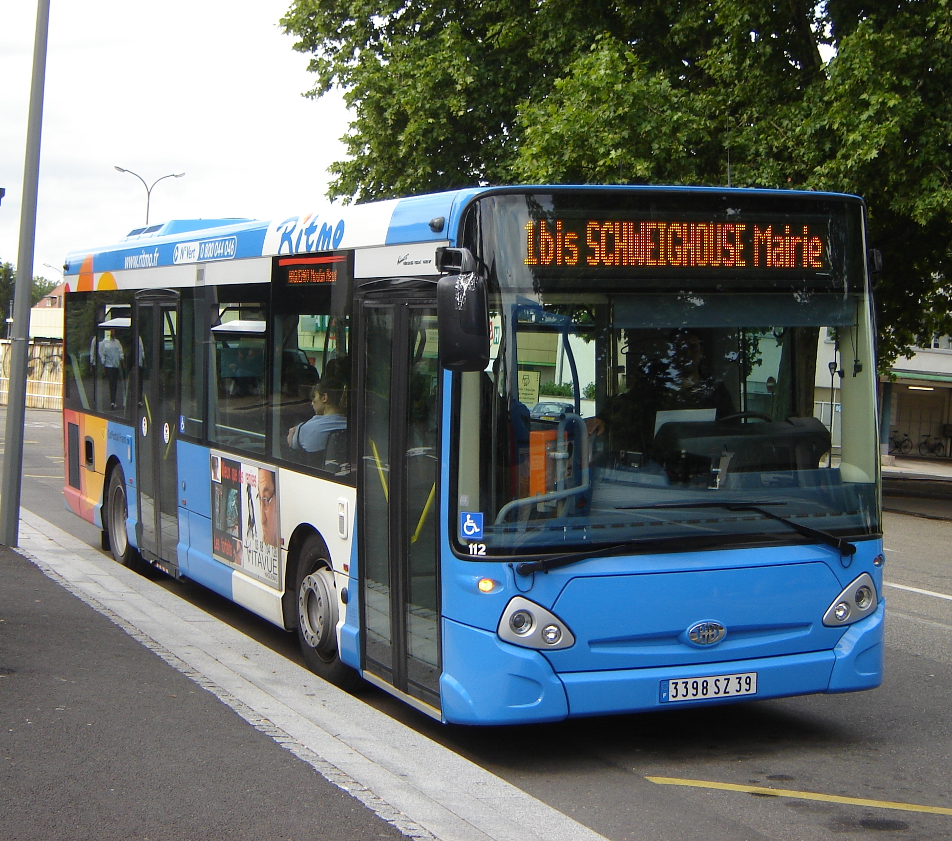 Heuliez GX 127 L du réseau RITMO d'Haguenau